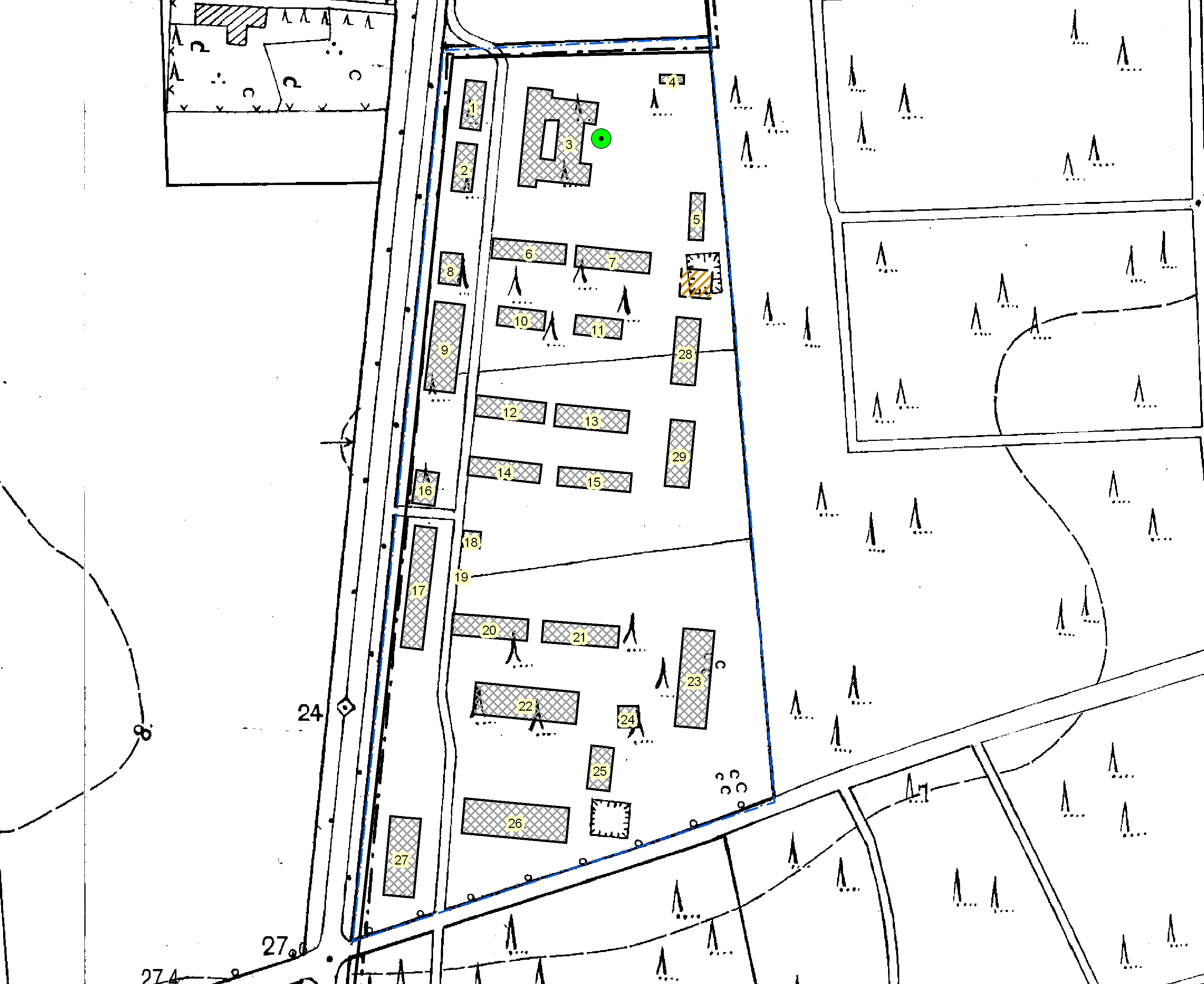 georeferenzierter Luftbildbefund